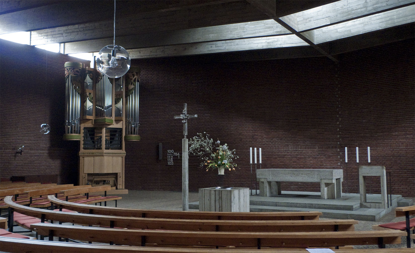 Kreuzkirche-München-Innen